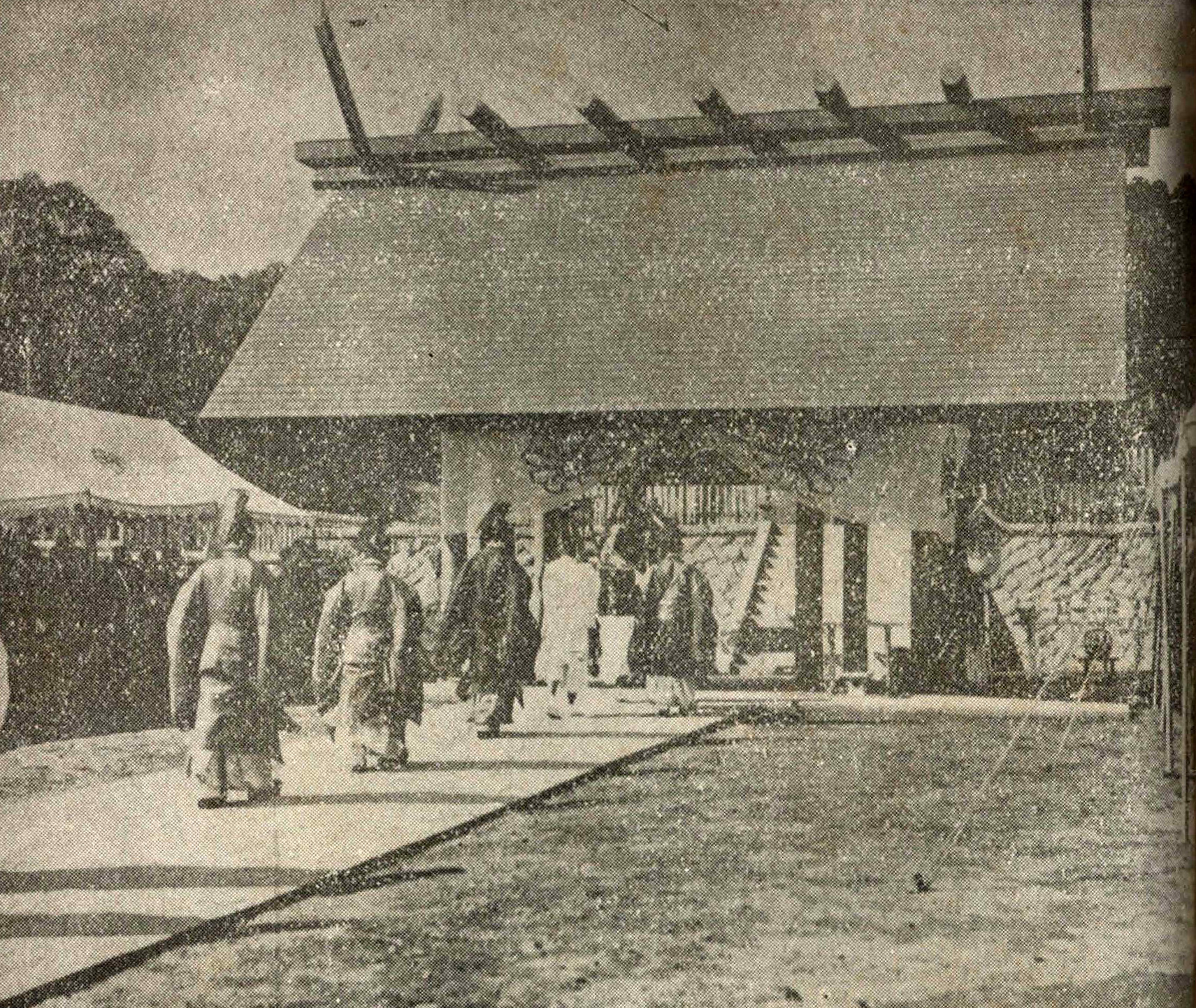 苗栗神社於1938年11月4日舉行鎮座祭之影像